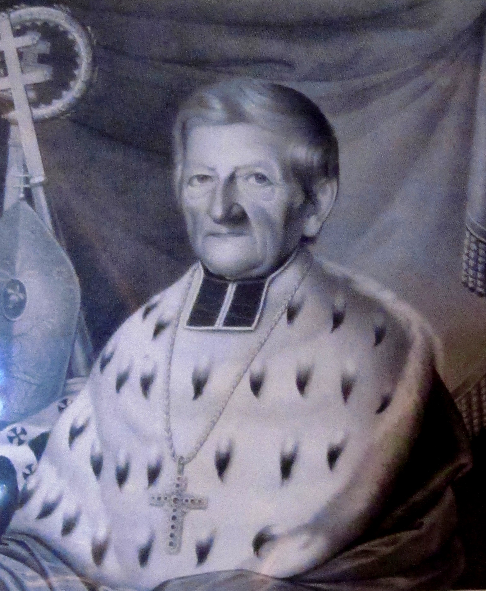 Hermann von Vicari (* 13. Mai 1773 in Aulendorf; † 14. April 1868 in Freiburg im Breisgau) war von 1842 bis 1868 römisch-katholischer Bischof, Erzbischof von Freiburg im Breisgau